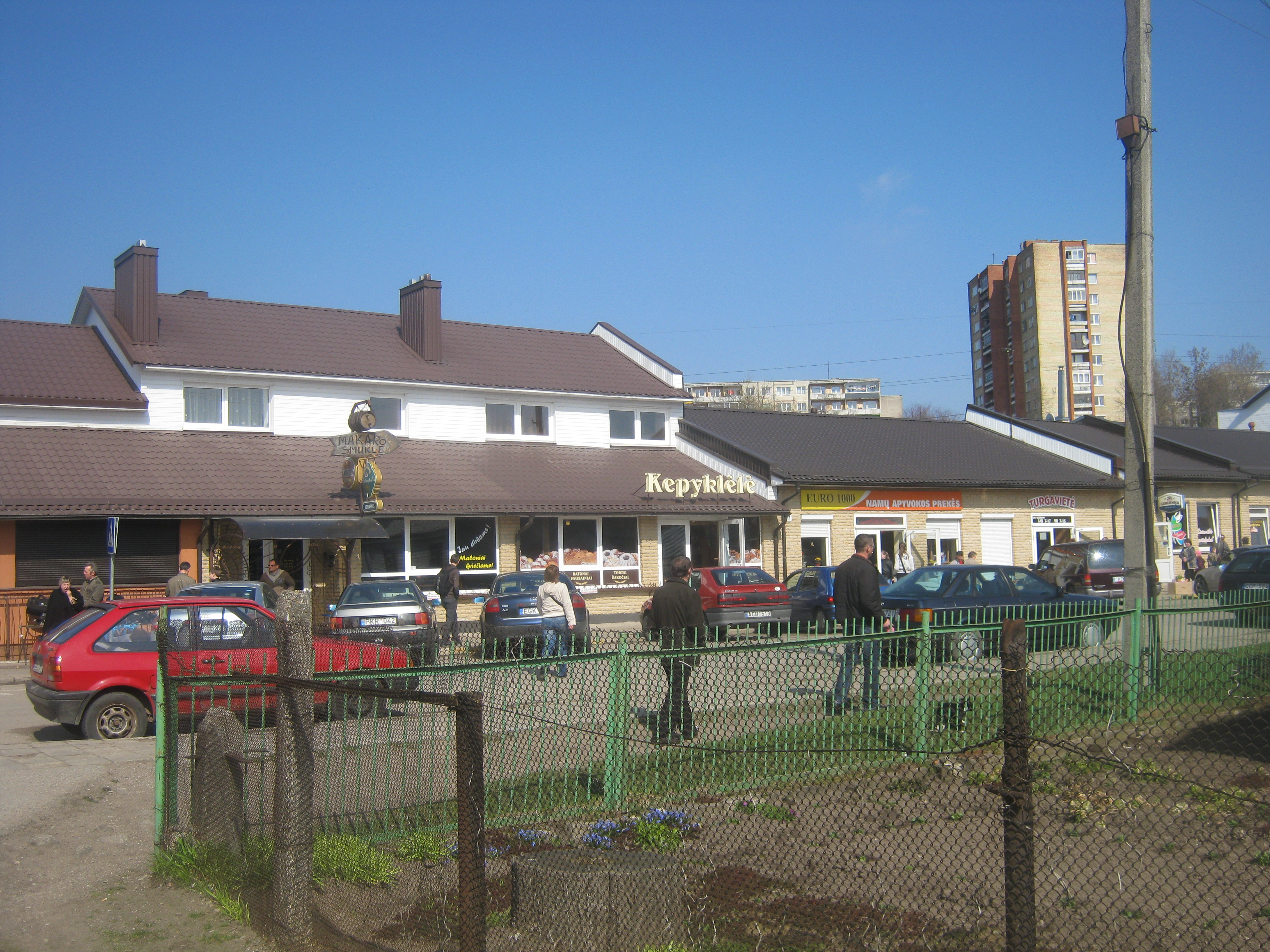 Jonavos turgus